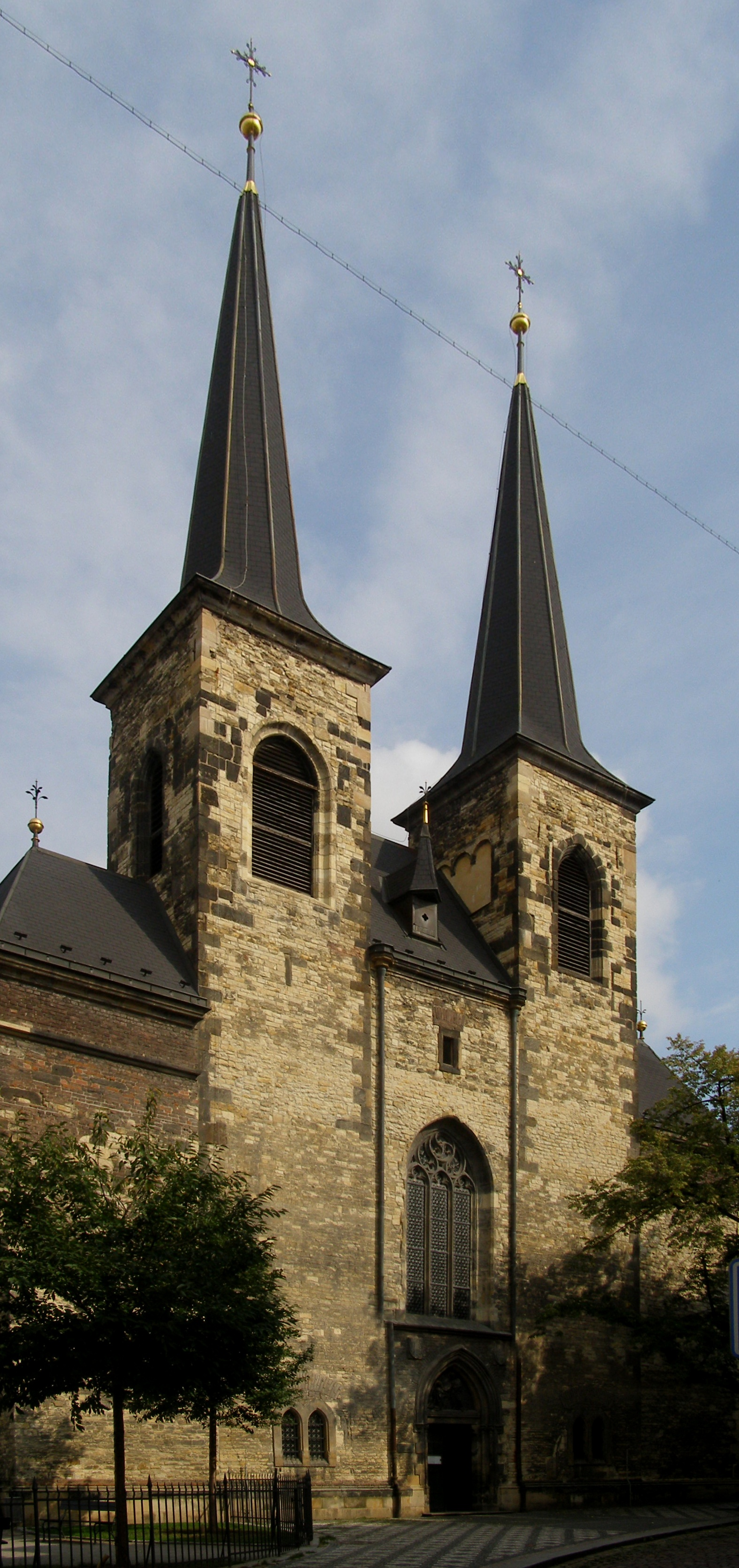 Kostel sv. Petra Na Poříčí (Nové Město), Praha 1, Petrská, zvonice čp. 1232, č. or. 14, Nové Město